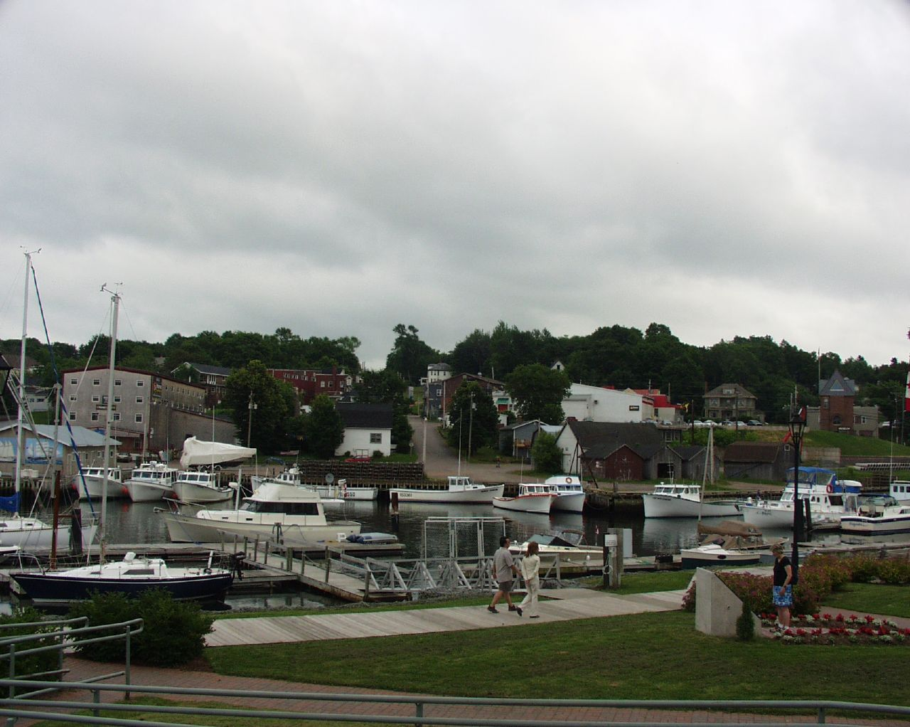 Montague